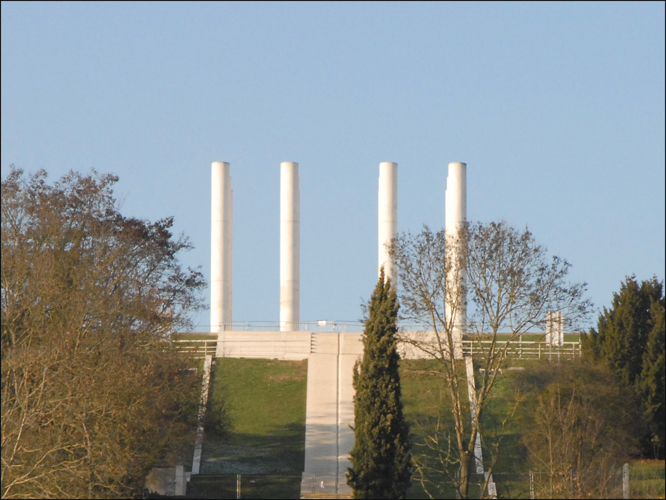 Sur la photo, les colonnes et une partie du jardin des droits de l'Homme de l'Axe Majeur. L'Axe Majeur, symbole architectural de la Ville-nouvelle de Cergy-Pontoise, est une œuvre monumentale de 3km de long conçue par Dani Karavan, un artiste plasticien et sculpteur né en 1930 à Tel-Aviv.